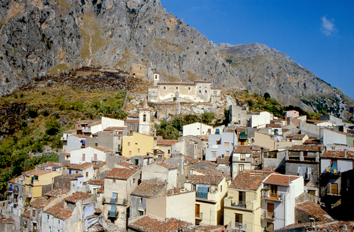 Isnello, provincia di Palermo, Italy